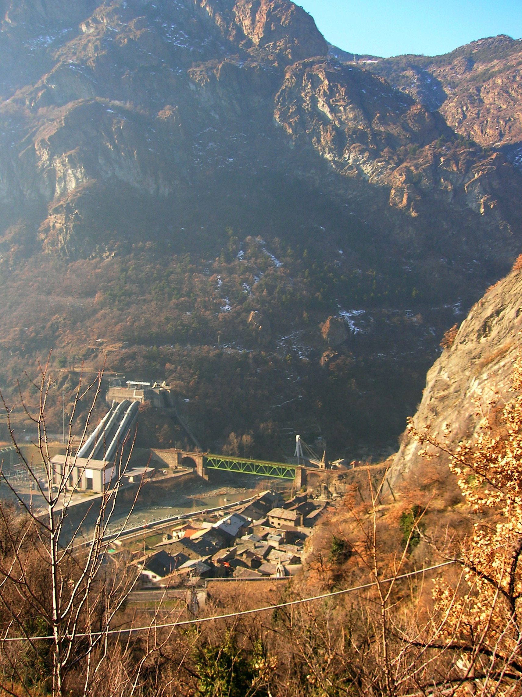 Montjovet, Aosta Valley, Italy.